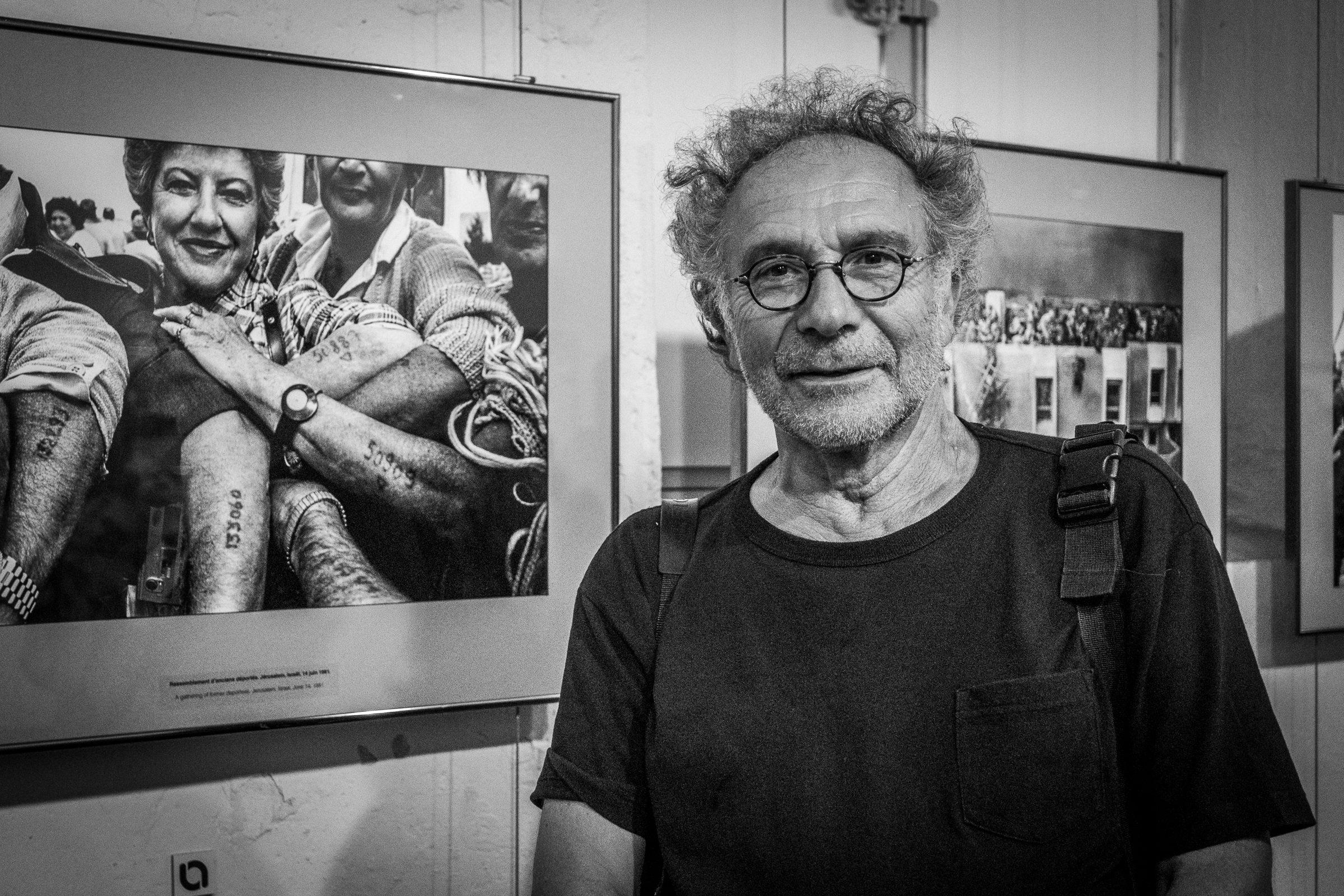 Alain Keler par Claude Truong-Ngoc en septembre 2019